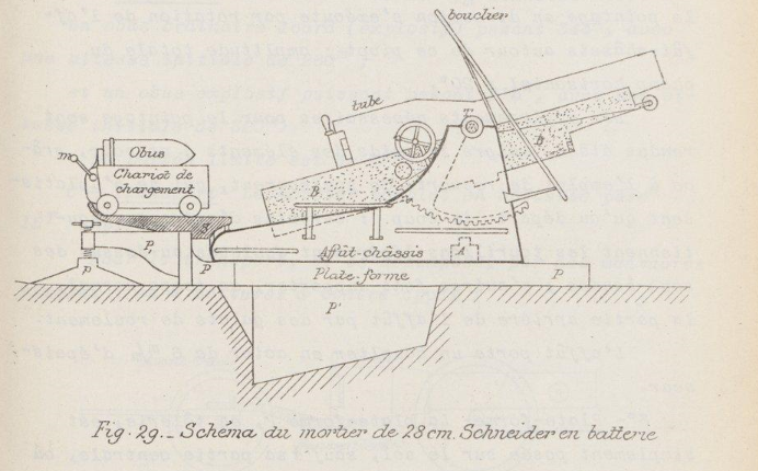 Schéma du mortier Schneider 280mm en batterie